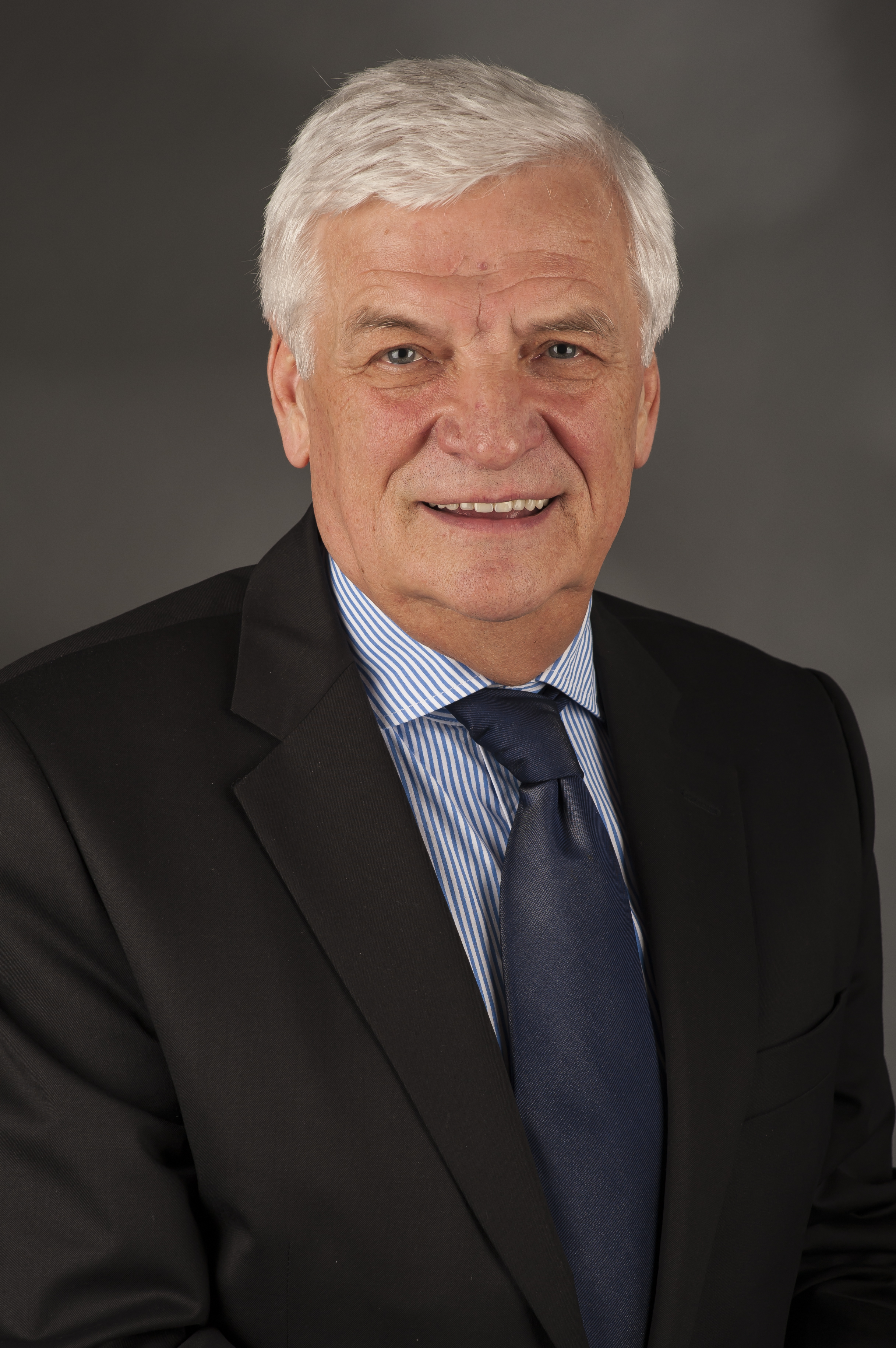 Jan Kozłowski.